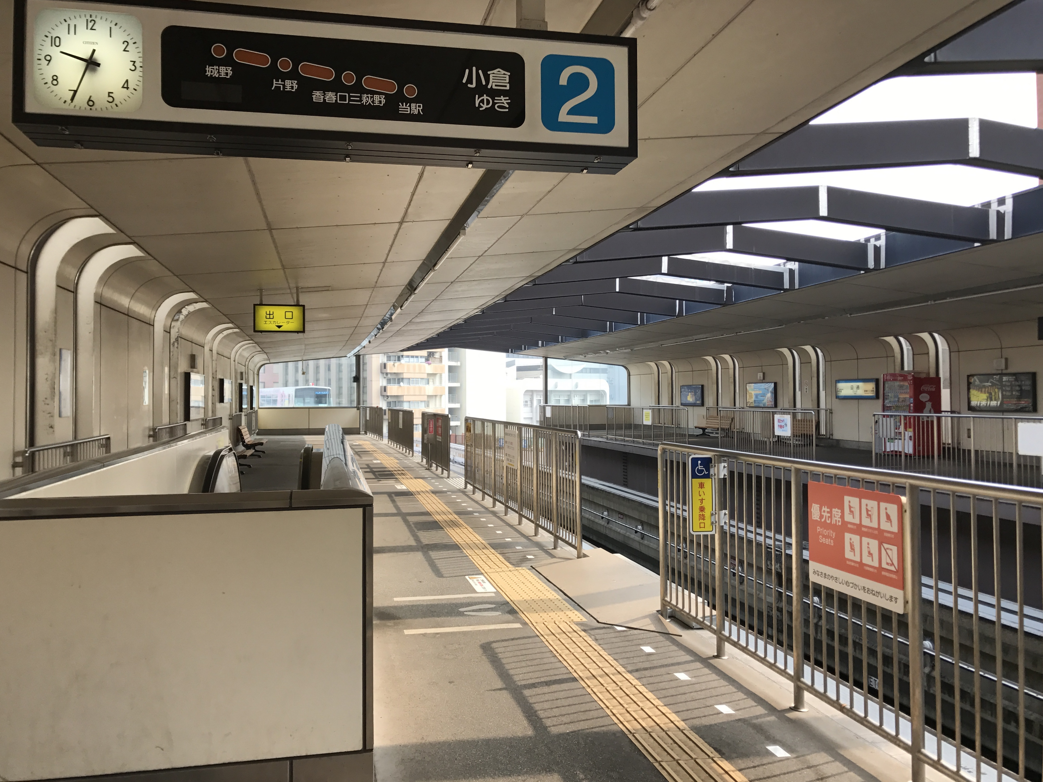 旦過駅のホーム(平和通方面)